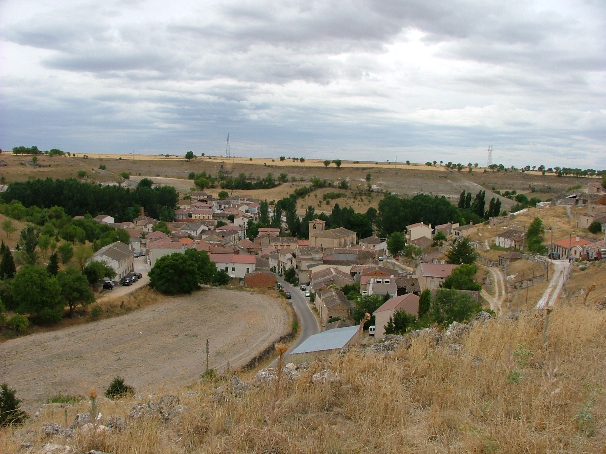 Vista de valtiendas